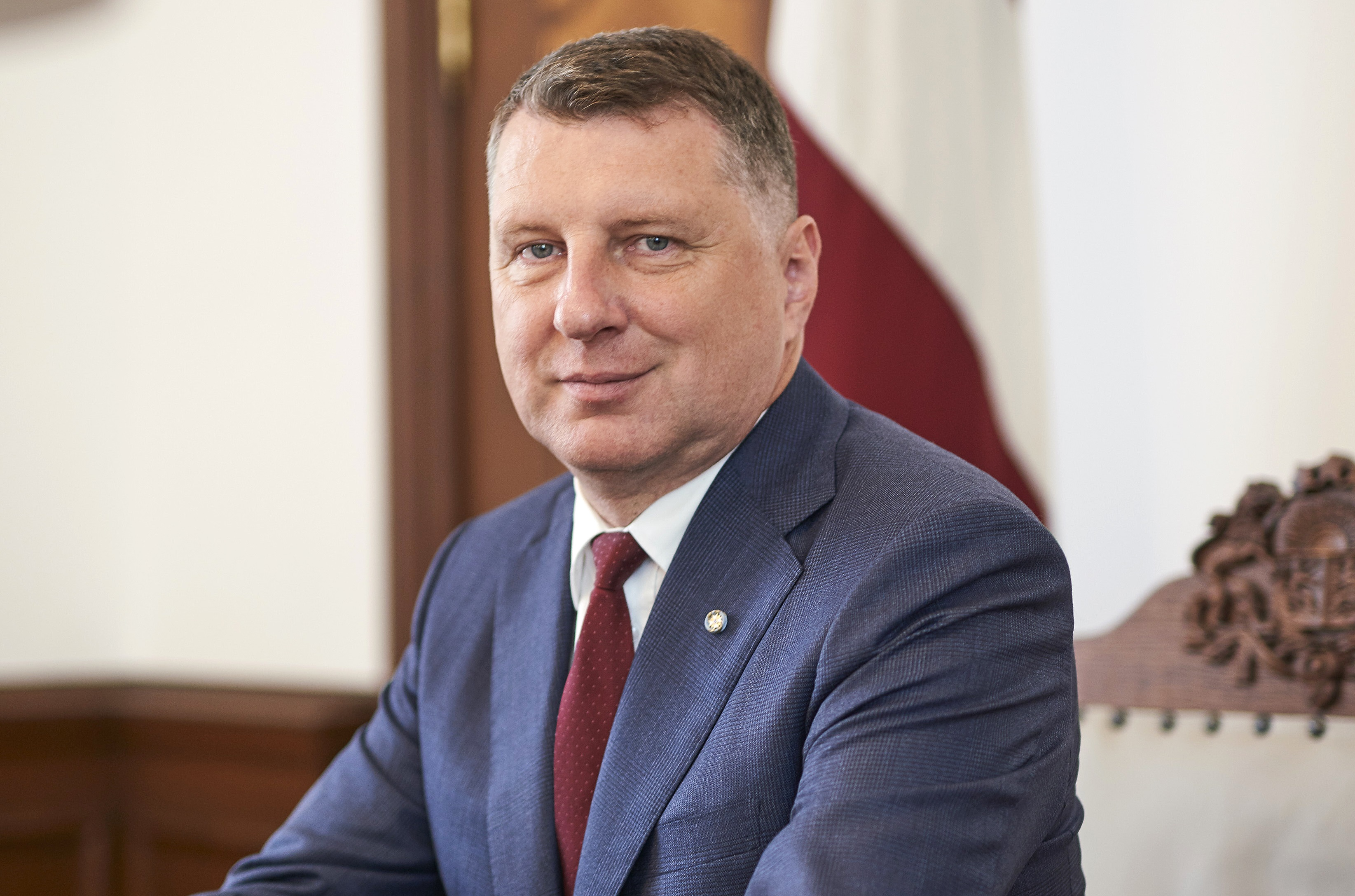 Raimonds Vējonis 2019. gadā